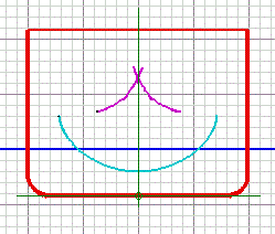 Rumpfquerschnitt eines Frachters (in aufrechter Lage) mit den Ortskurven des Formschwerpunkts B und des wahren Metazentrums M für Krängungswinkel von -85° bis +85°